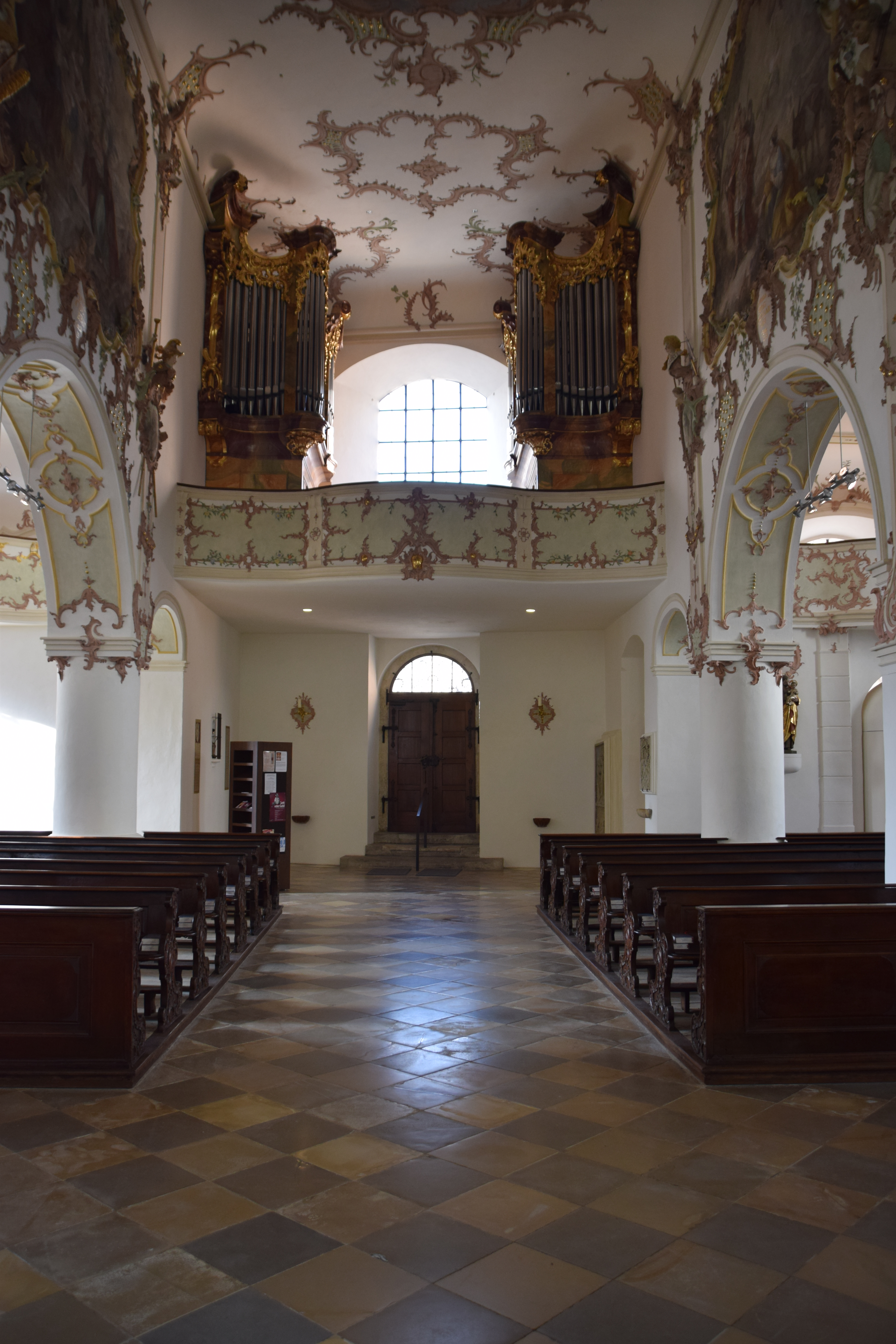 Mittelschiff der Stiftspfarrkirche St. Kassian in Regensburg gegen Westen